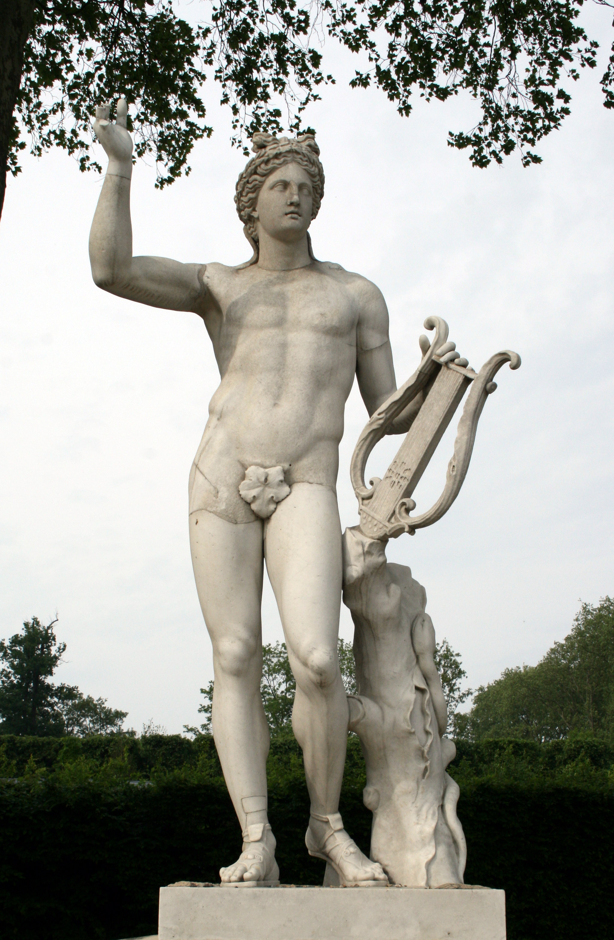 Apollon à la lyre dans la demi-lune du bassin d'Apollon du Park de Versailles.